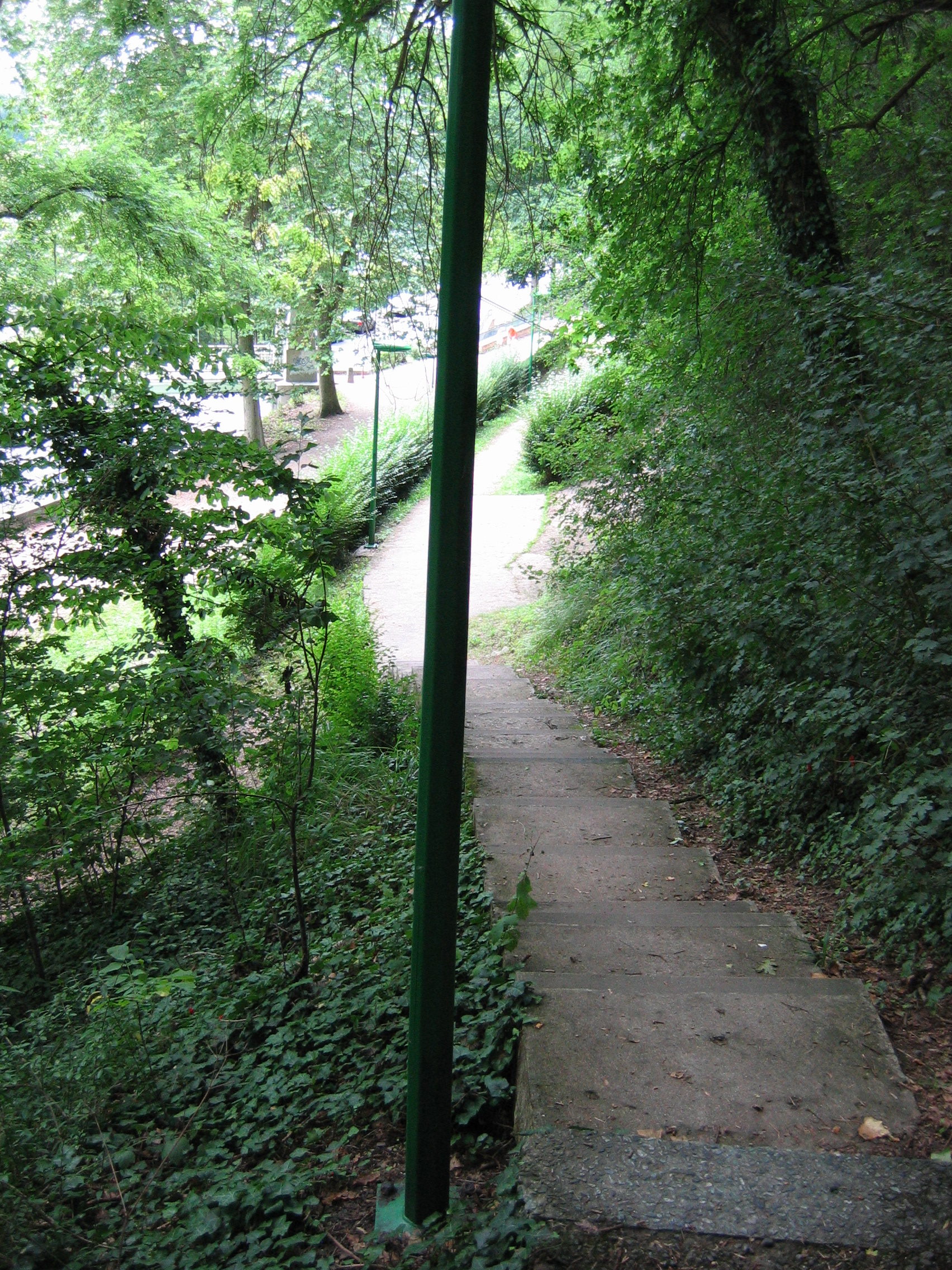 Promenade sur le Mont-Olympe à Charleville-Mézières, en Ardennes, France